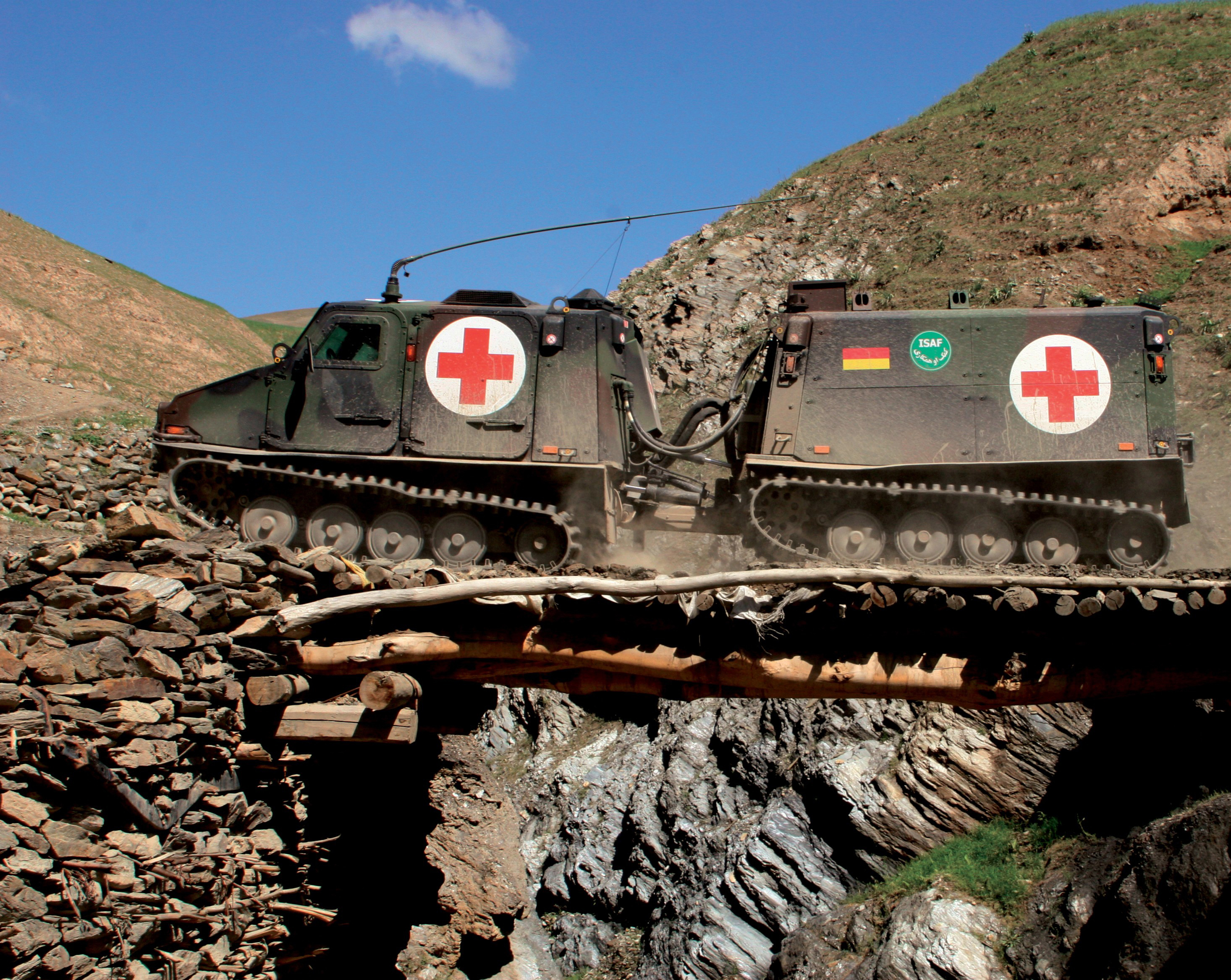 Führungs und Transportfahrzeug BV 206S (Husky /Hägglund) im Gebirge von Afghanistan überquert eine Brücke. ©Bundeswehr/Piz San